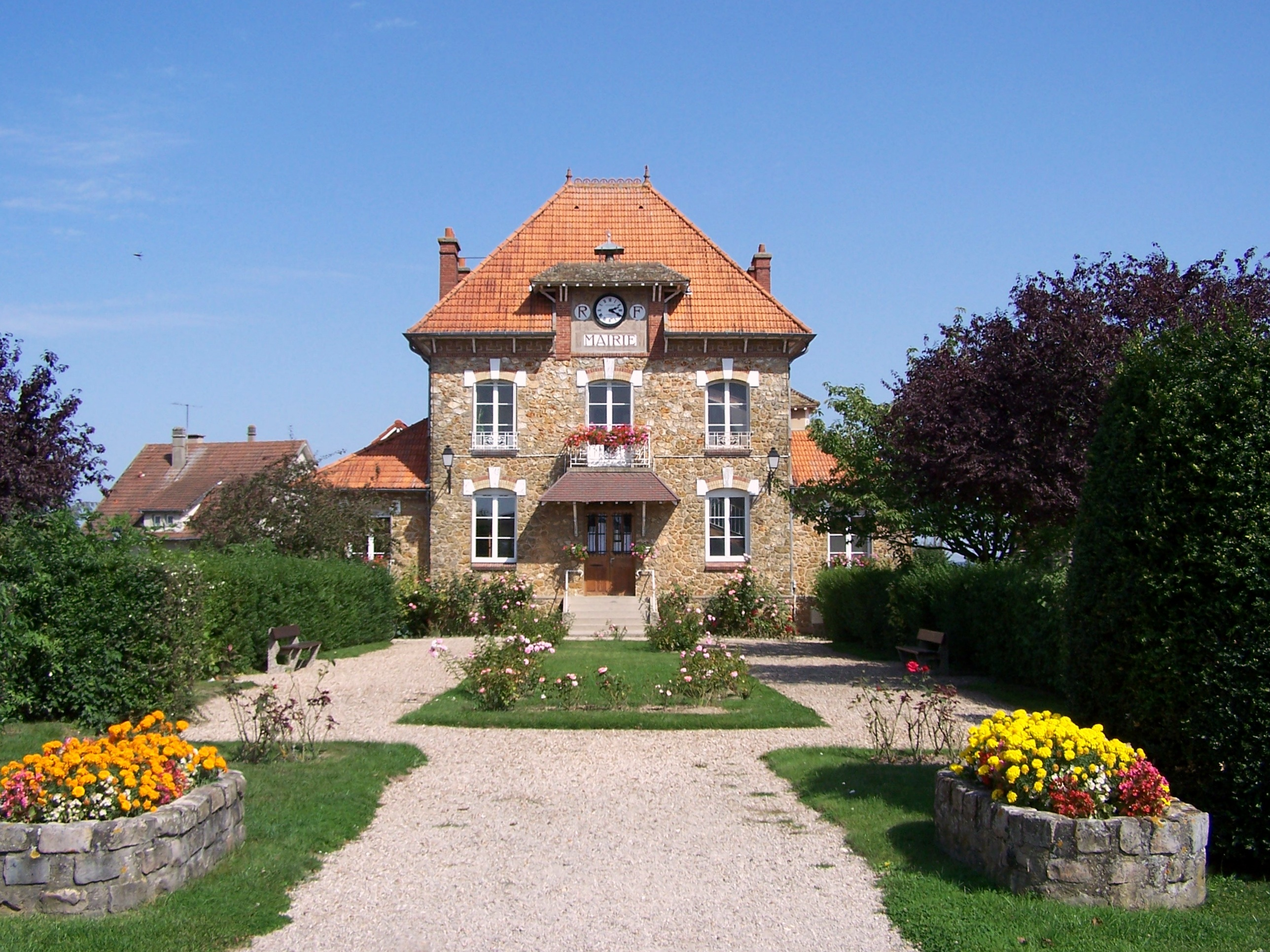 Mairie d'Orgerus (Yvelines, France)